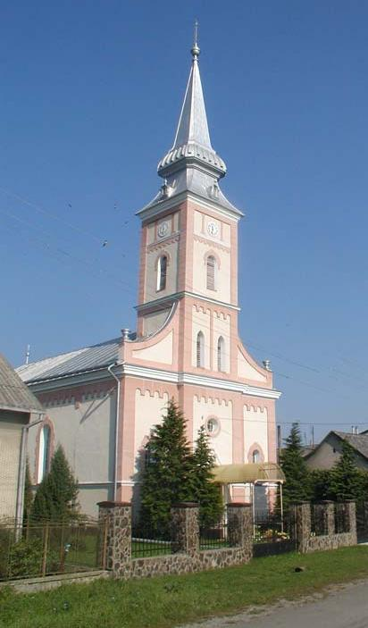 Tiszasalamon református temploma